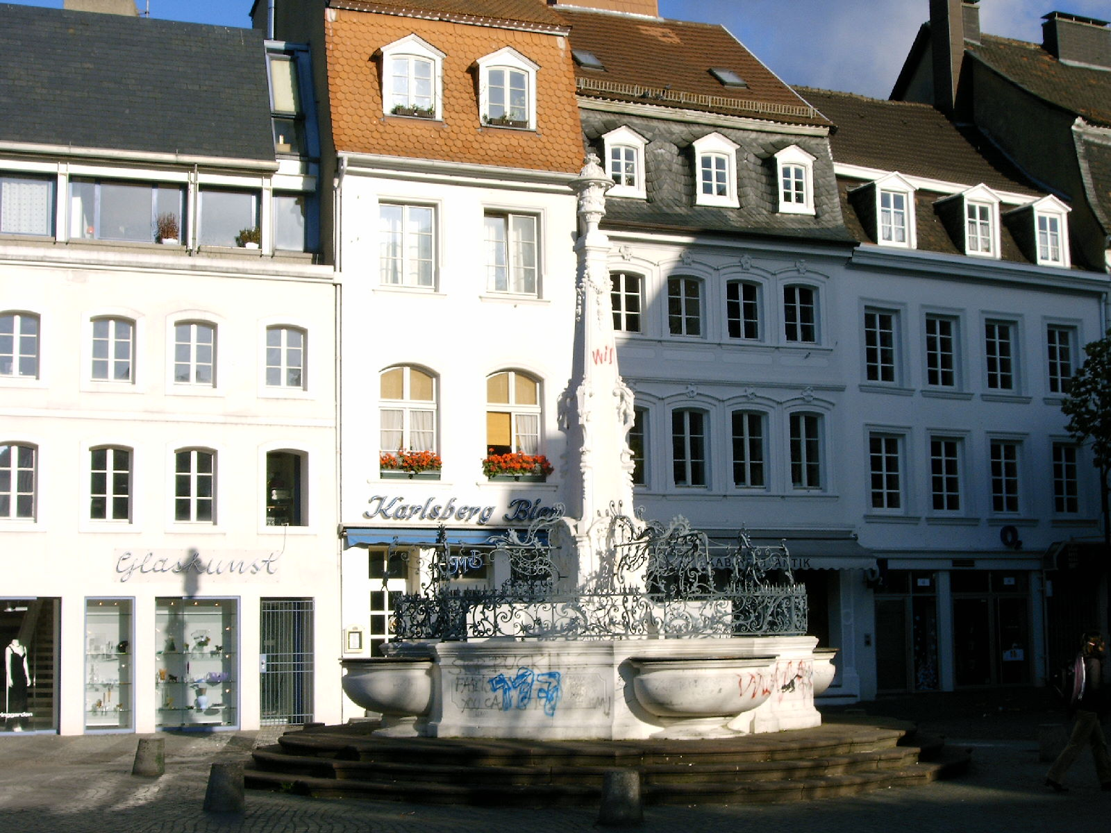 Sankt Johanner Markt mit Brunnen Author: Holger Peifer Homepage